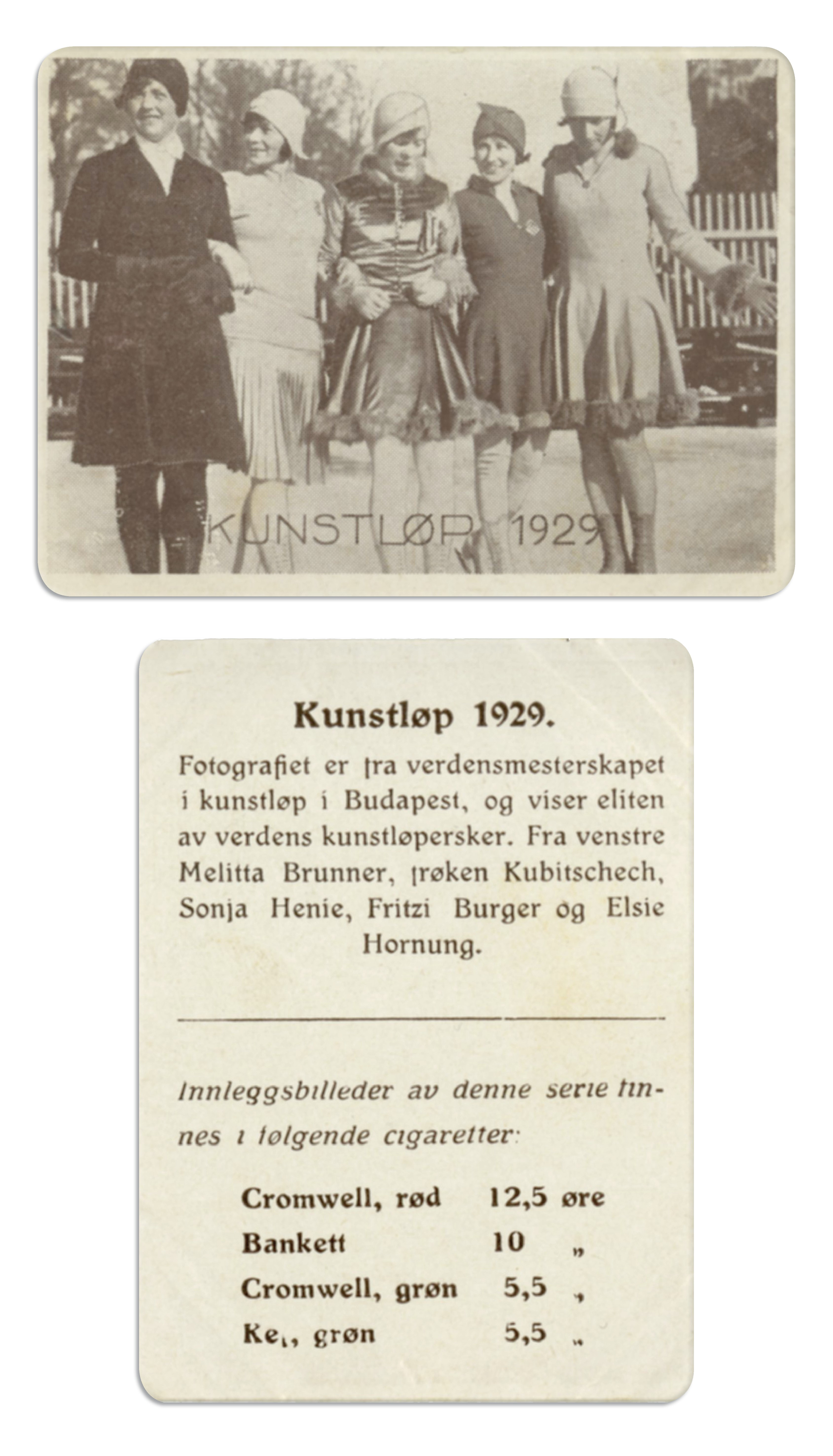 Format: Samlekort Dato / Date: ca. 1930 (dokumentet) Fotograf / Photographer: Ukjent Wikipedia: VM i kunstløp 1929 Eier / Owner Institution: Trondheim byarkiv, The Municipal Archives of Trondheim Arkivreferanse / Archive reference: Sportsklubben Freidig: Sigarettfoto ca. 1930 (Løpenr. 75) F23947 Tekst på baksiden: Kunstløp 1929. Fotografiet er fra verdensmesterskapet i kunstløp i Budapest, og viser eliten av verdens kunstløpersker. Fra venstre Melitta Brunner, frøken Kubitschech, Sonja Henie, Fritzi Burger og Elsie Hornung. Merknad: Disse samlekortene med bilder av norske og internasjonale idretthelter fulgte med i sigarettpakker på 1920 og 30-tallet - derav tobakksreklamen på baksiden. Samlekortene kommer fra Sportsklubben Freidigs arkiv, og inneholder nærmere 90 unike kort pent plassert i et samlealbum. Samleren var den senere skipsmegler Finn Følling (1914 – 1985).